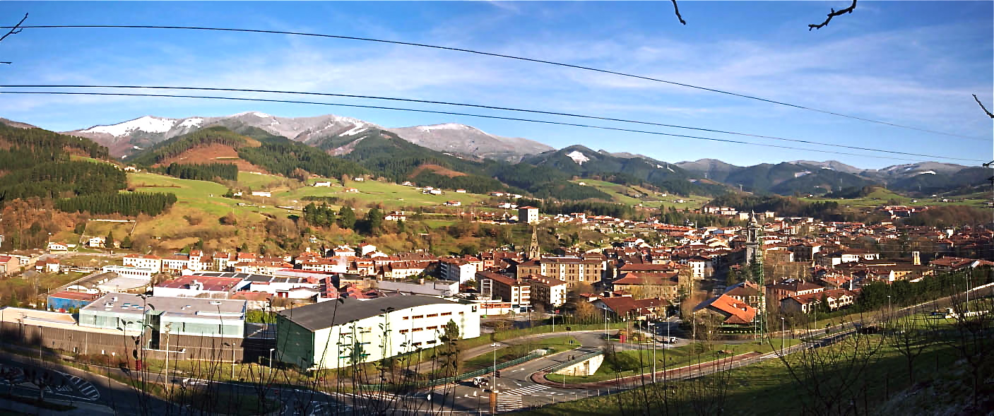 Vista panoramica de Oñati